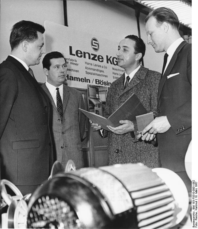 Leipzig, Frühjahrsmesse, Goldmedaille Zentralbild/Reiche 10.3.1967 LEIPZIGER FRÜHJAHRSMESSE 1967 Technische Messe, Halle 1967 Das Disco-Planetenregelgetriebe von der Maschinenfabrik Hans Lenze KG, Bösingfeld wurde am 10.3.1967 mit einer Goldmedaille ausgezeichnet. UBz.: V.l.n.r.: Dr. Rosin vom DAMW, Dr. Müller vom Messeamt und die Herren Kalis und König von der Firma Hans Lenze KG.